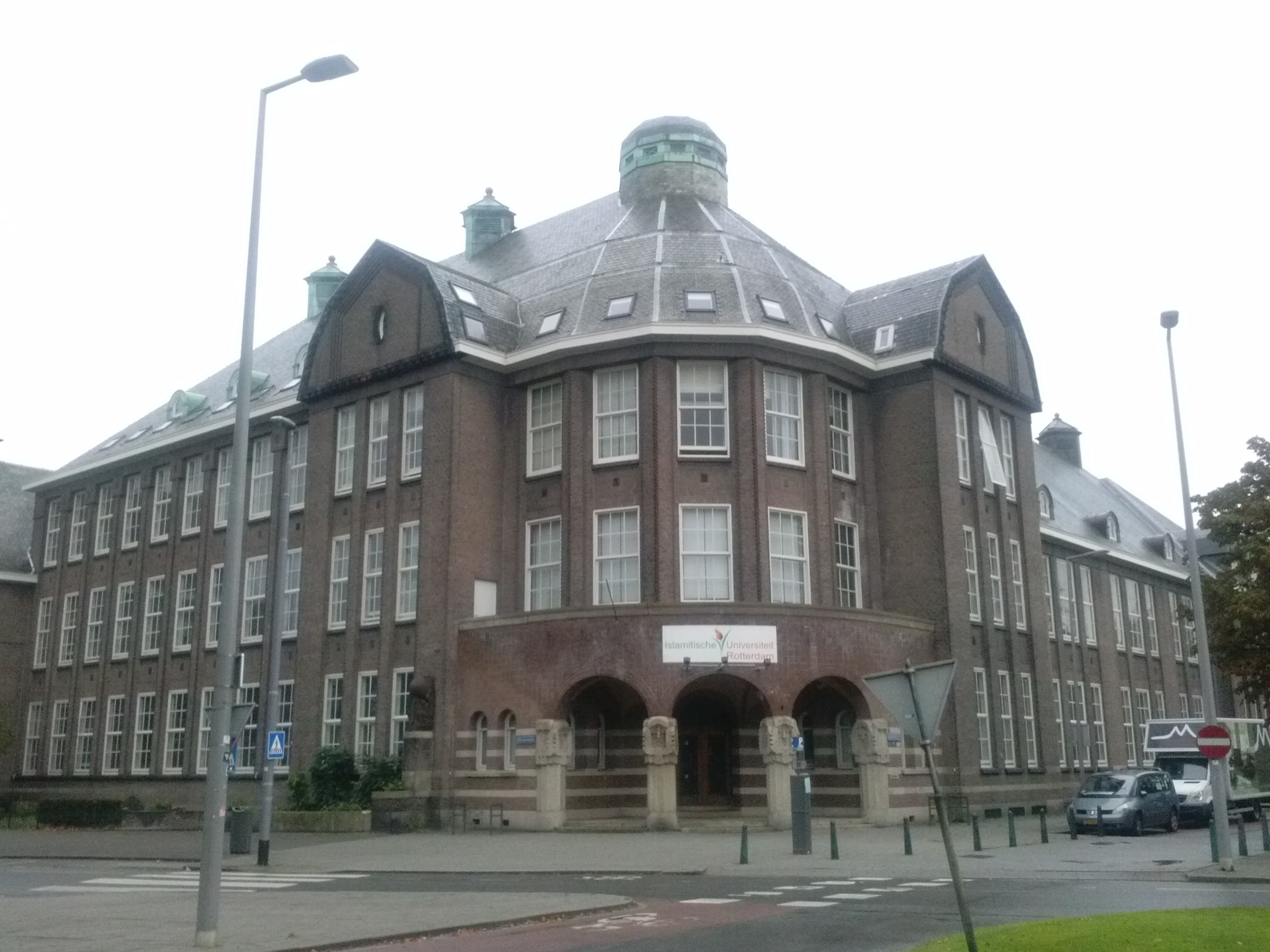 Voorkant van de Islamitische Universiteit Rotterdam